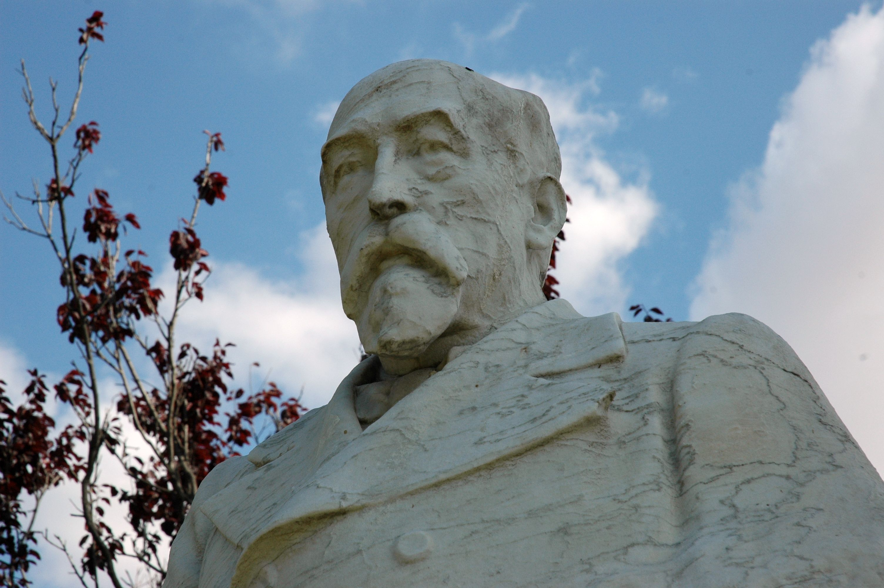 Marian Aguiló i Fuster. Obra d'Eusebi Arnau. Inastal·lada al Parc de la Ciutadella (Barcelona) el 9 de maig de 1907.